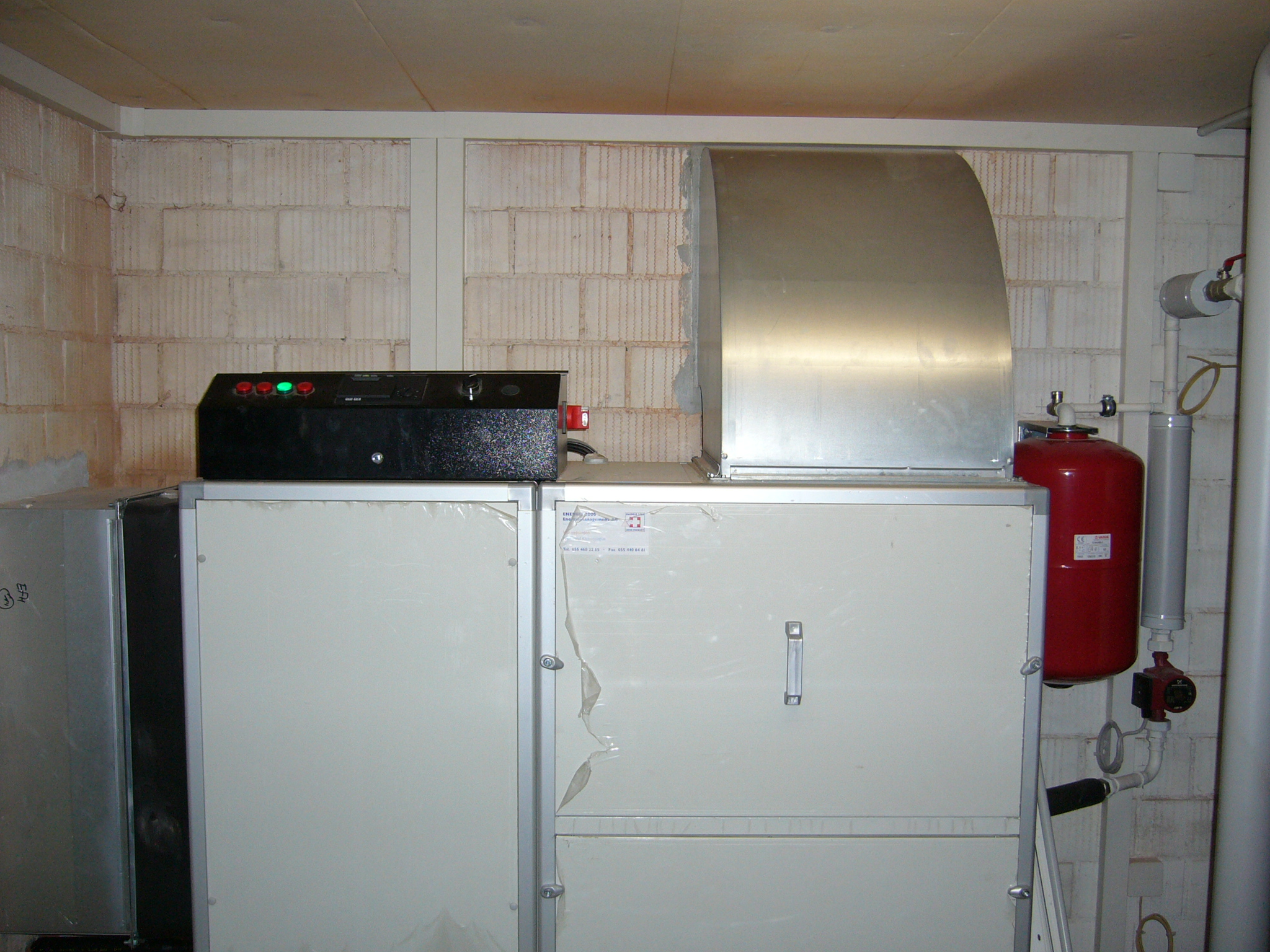 Wärmepumpenheizung, welche die Wärme aus der Umgebungsluft entzieht.